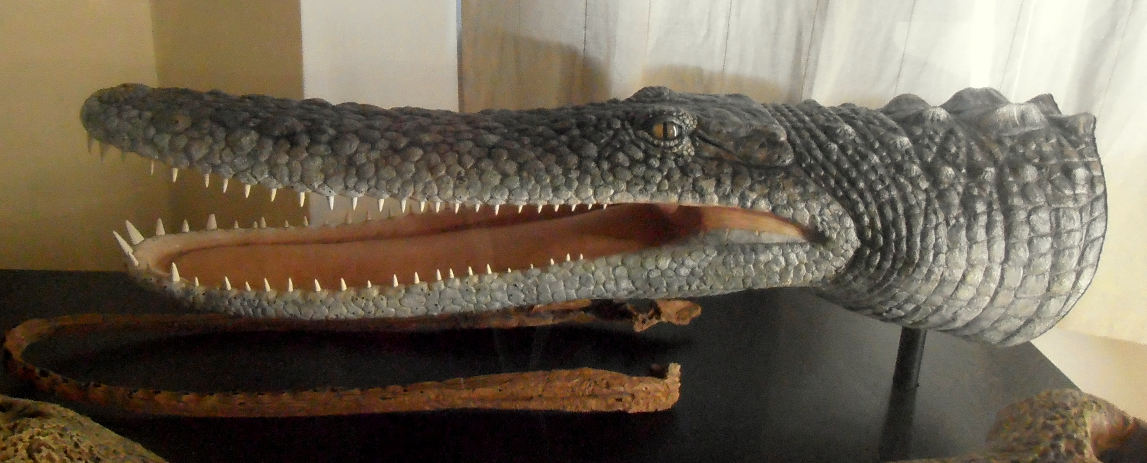 Ricostruzione museale di testa di Laganosuchus